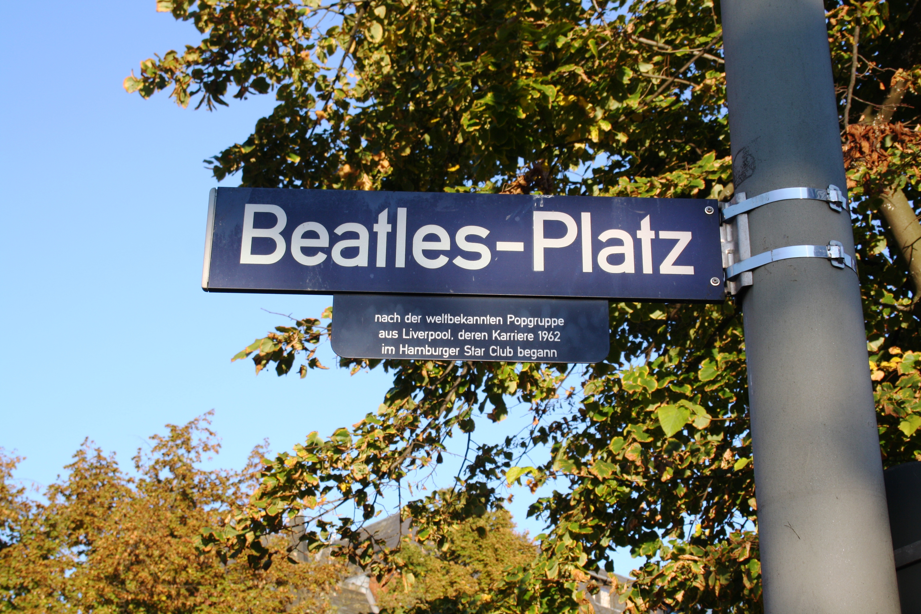 Straßenschild des Beatle Platzes in Hamburg St. Pauli.